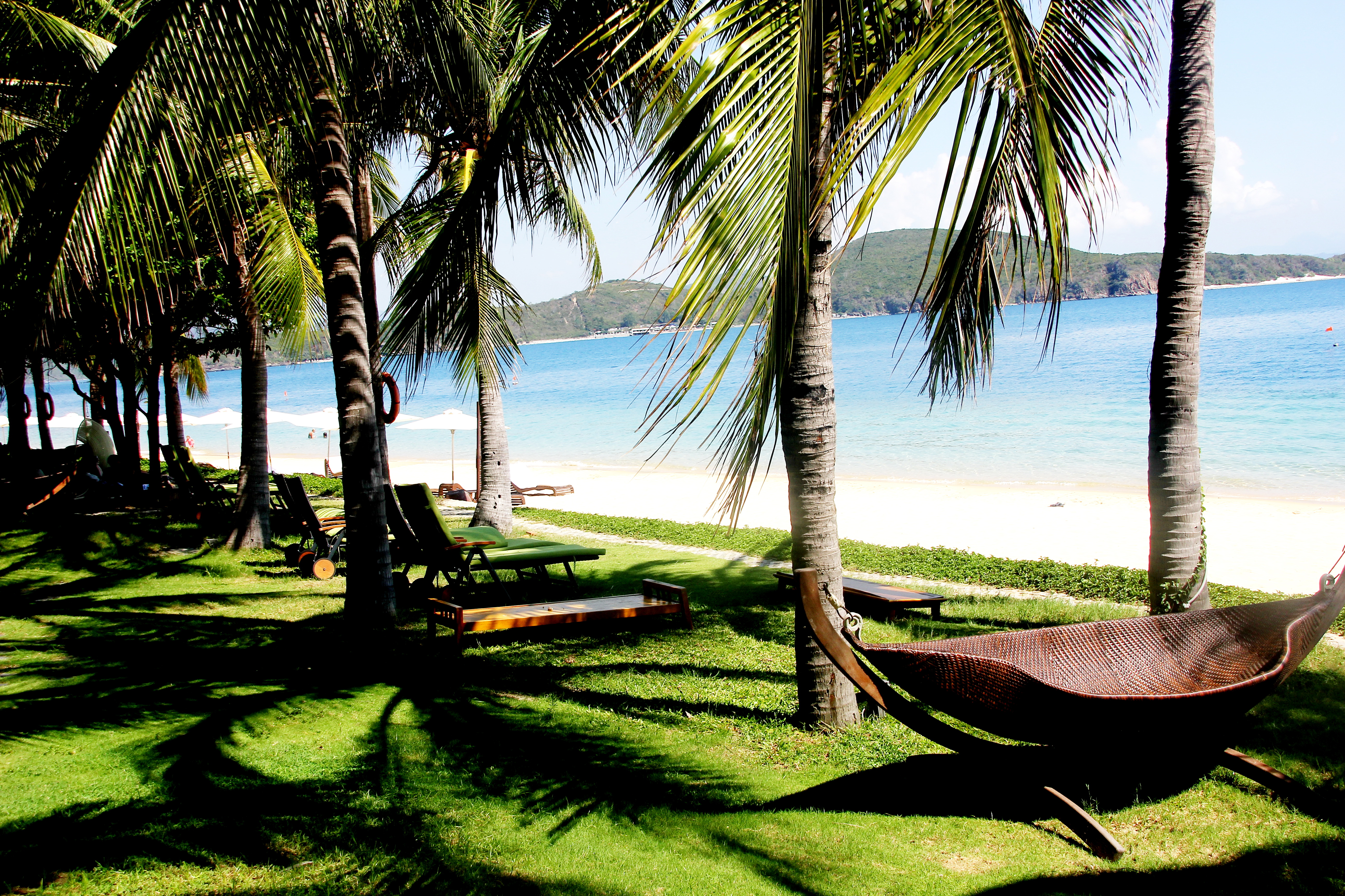 Đảo Hòn Tằm ngày nay